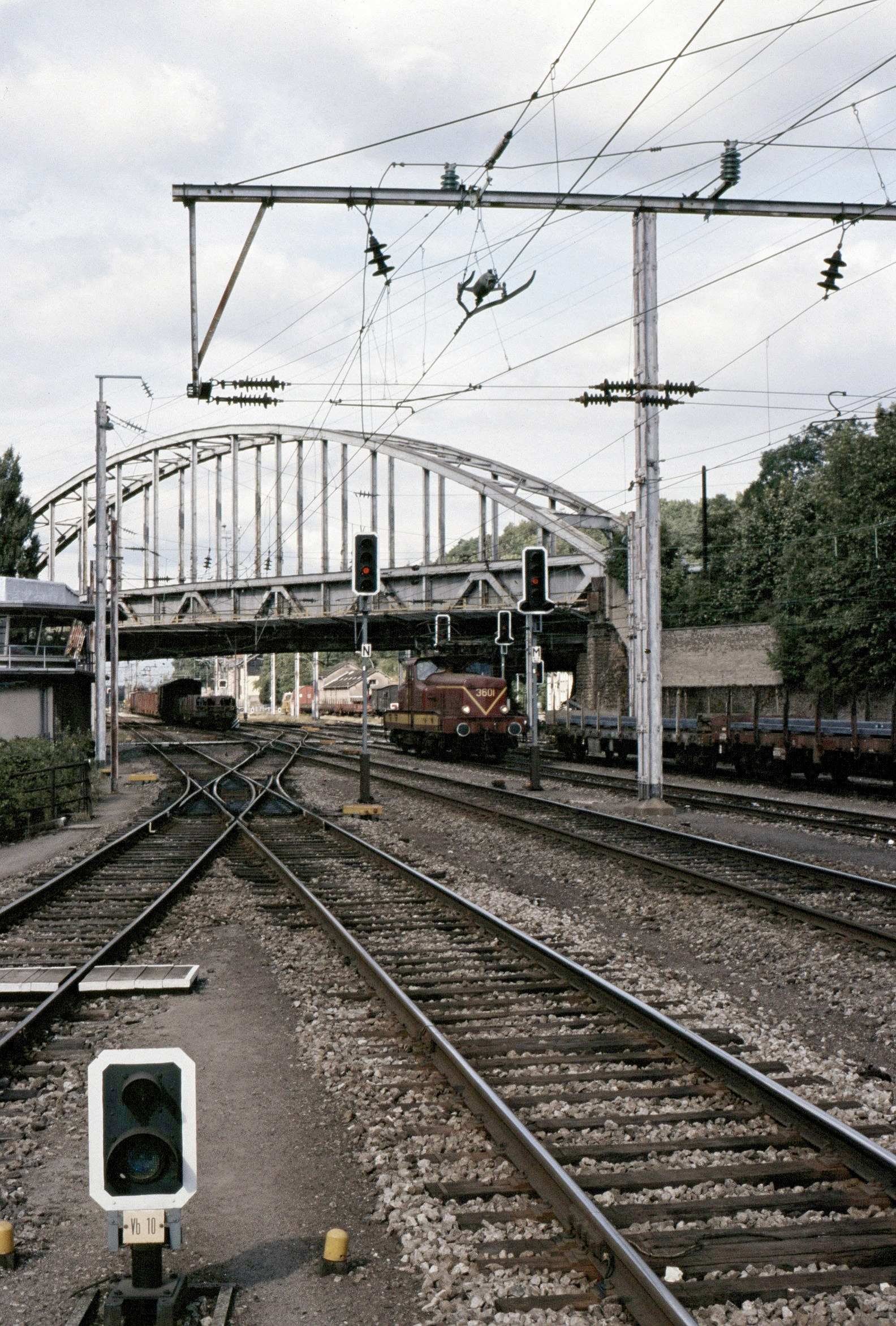 Gare de Esch-sur-Alzette